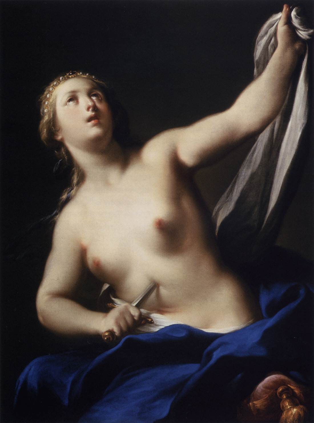 Lucretia